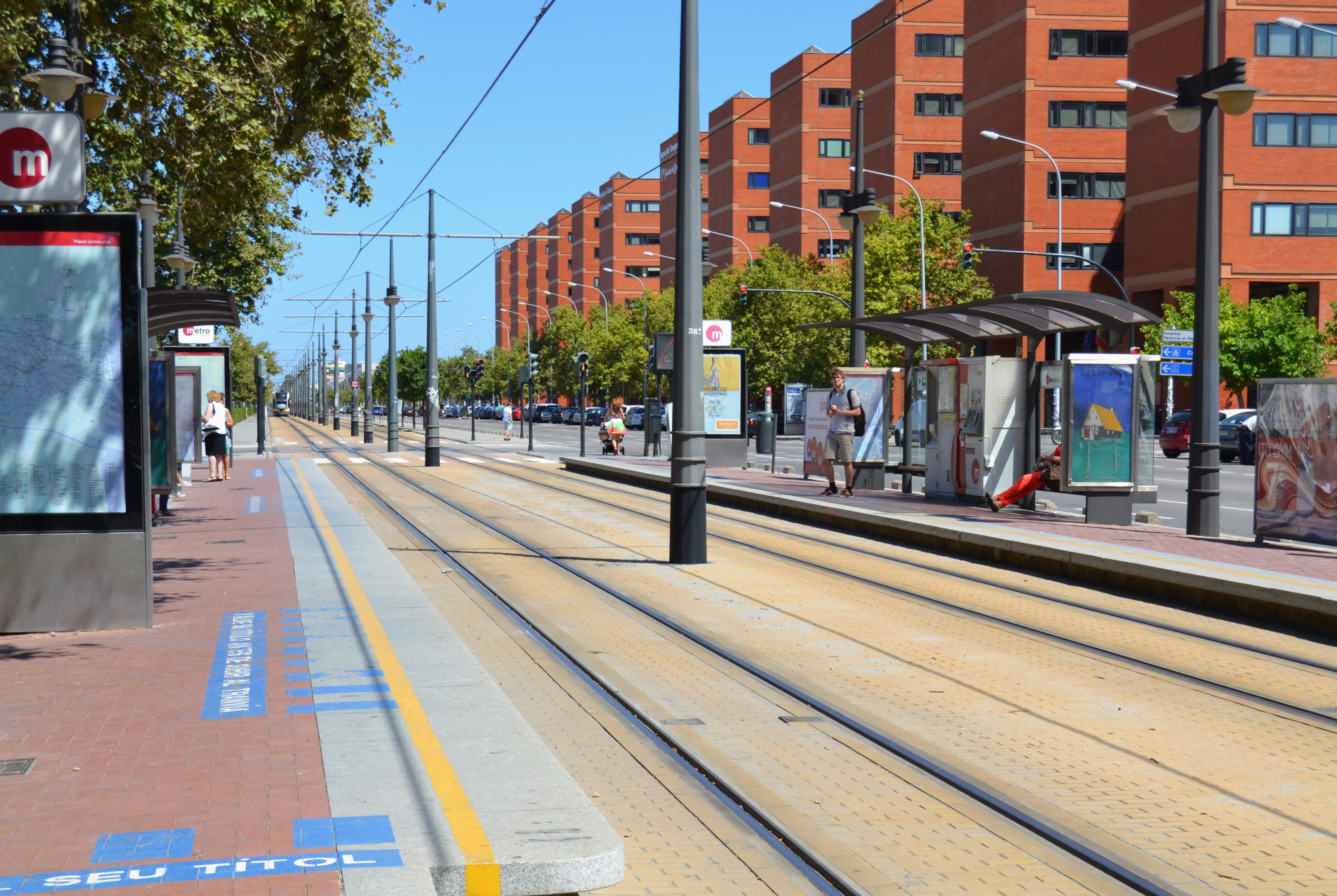 Estació de la Carrasca, tramvia de València.